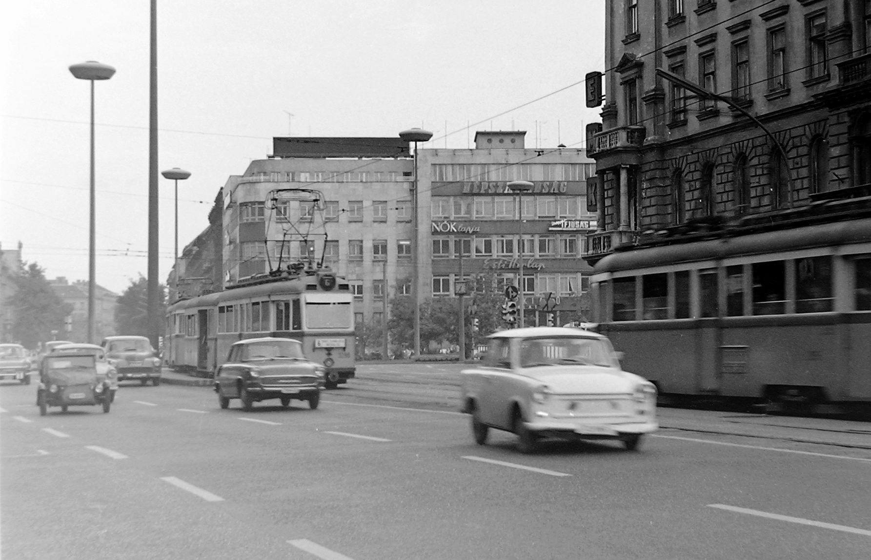 Blaha Lujza tér. Location: Hungary, Budapest VIII. Tags: tram, Skoda-brand, Trabant-brand, traffic, Czechoslovak brand, Gerrman brand, Velorex-brand, automobile, Ganz-brand, Ganz UV tramway, Hungarian brand, street view, lamp post, watch, Budapest Title: Blaha Lujza tér.